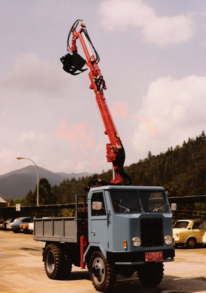 Template:Carroceta para uso mederero